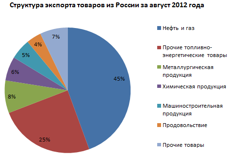 Структура товарного экспорта из России за август 2012 года. [1]